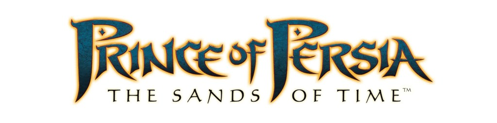 Título del juego Prince of Persia: Las Arenas del Tiempo